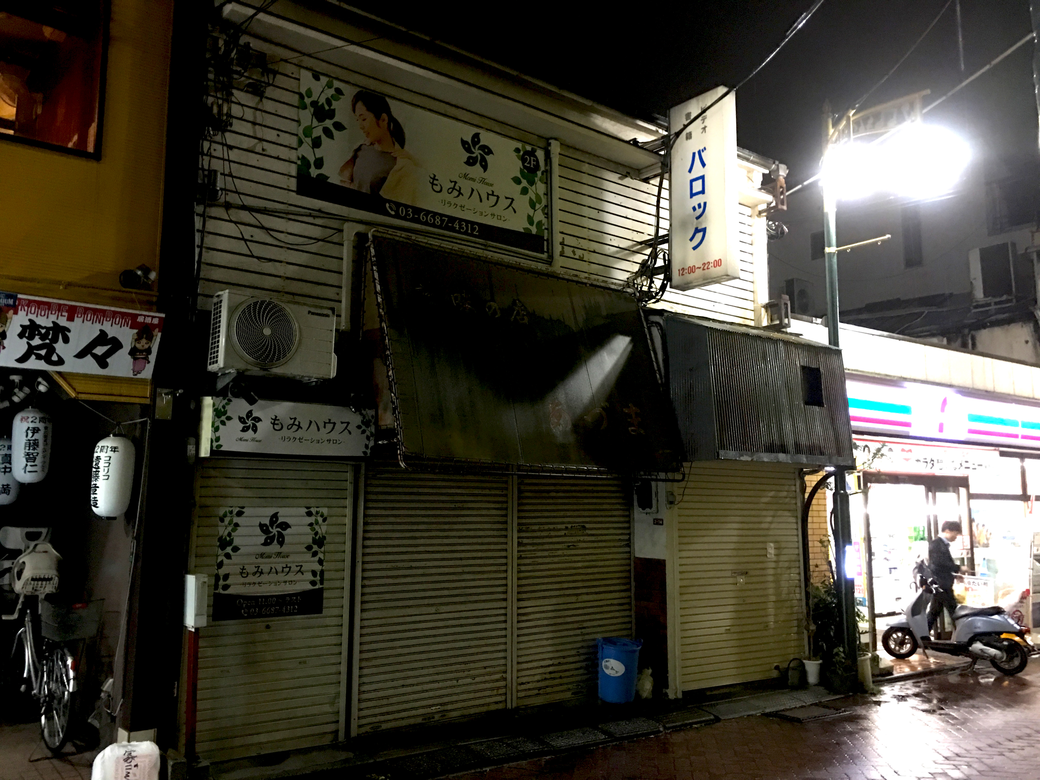 高円寺バロック跡地（2019年5月21日撮影）